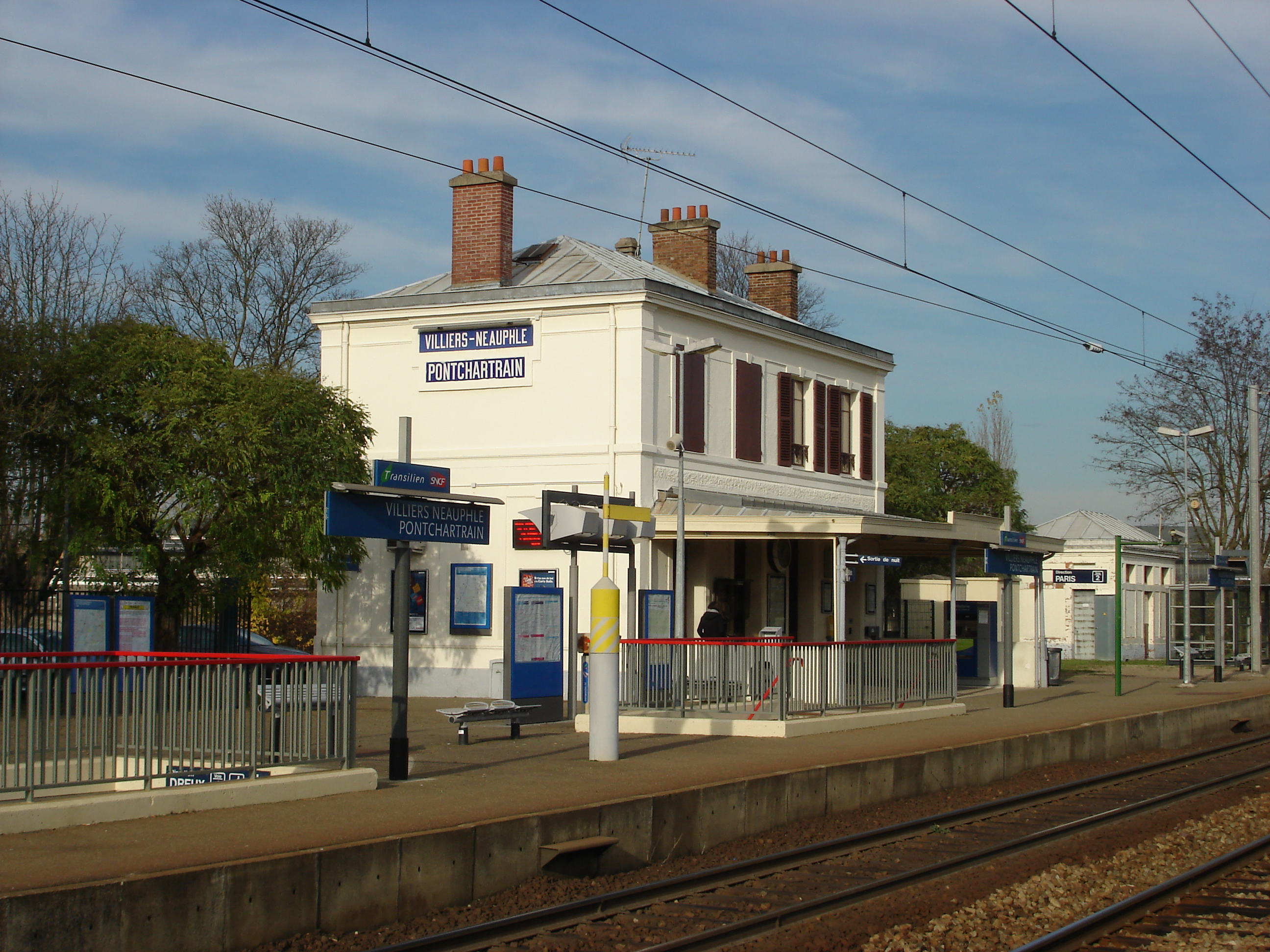 Gare de Villiers - Neauphle - Pontchartrain (78) : Le bâtiment voyageurs et sa marquise.